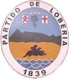 Escudo del partido de Lobería.